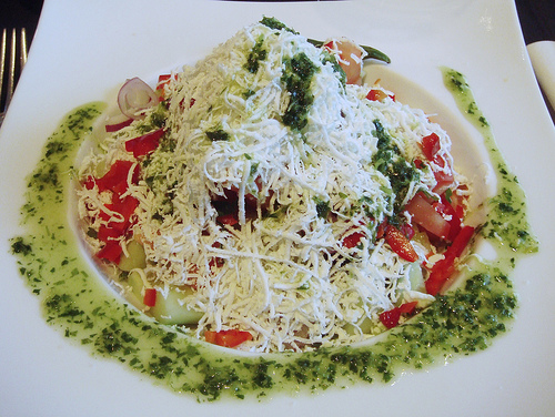 Изглед на шопска салата